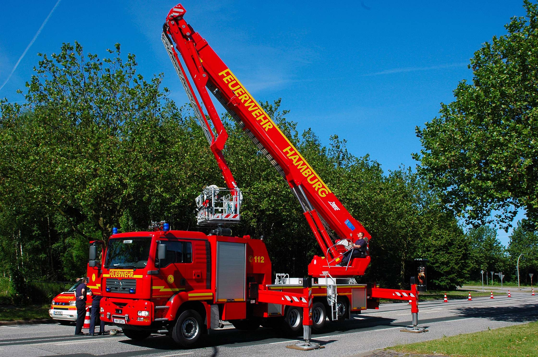 Teleskopmastfahrzeug der Feuerwehr Hamburg Quelle: Heiner Lahmann Fotograf: Heiner Lahmann Datum: 18.06.2005